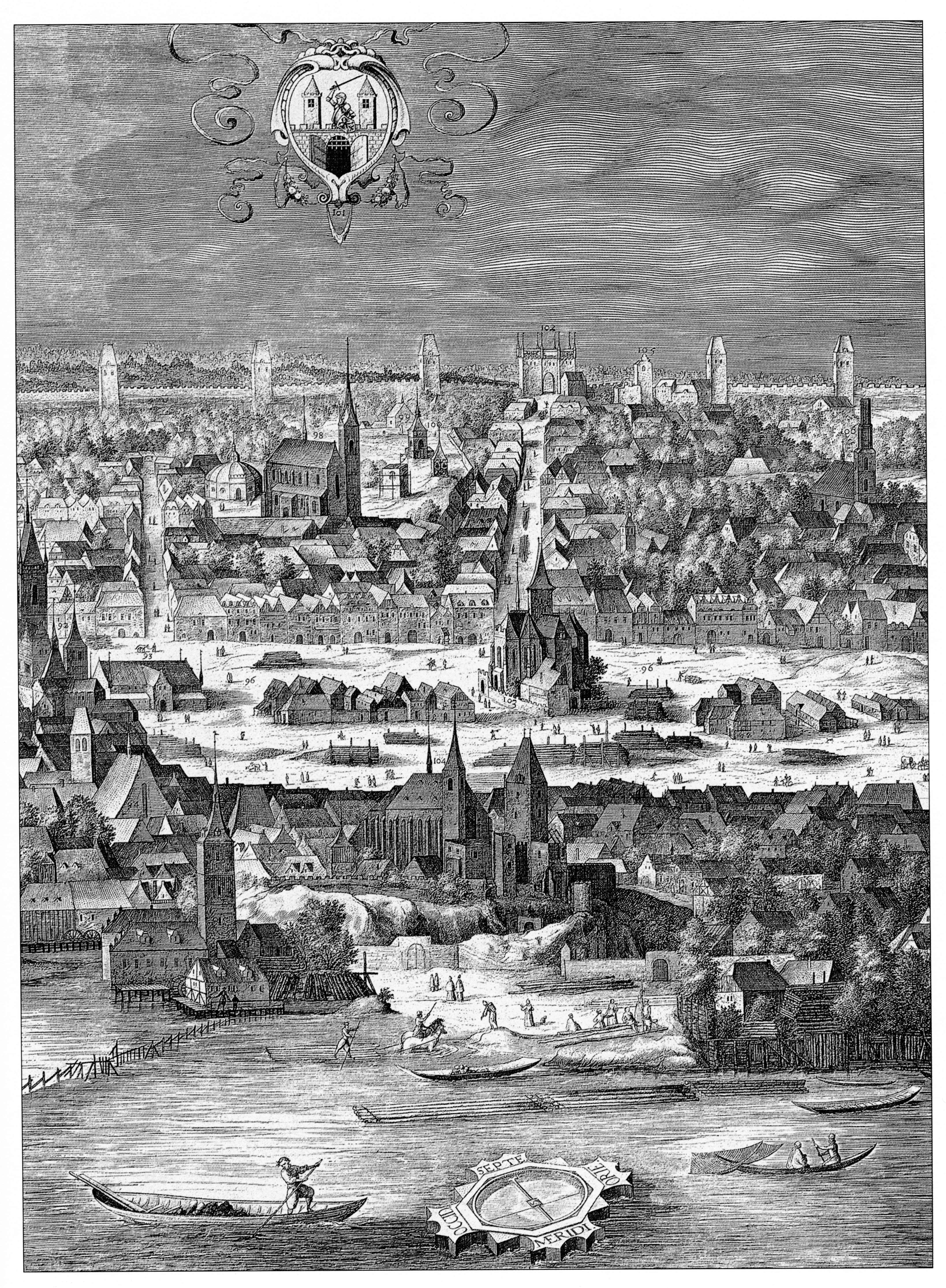 Výřez z tzv. Sadelerova prospektu, který zobrazuje část Nového Města. Dobytčí trh (nynější Karlovo nám) s kaplí Božího těla uprostřed (č. 103), Žitná a Ječná ulici s okolím. Scan 600 DPI.